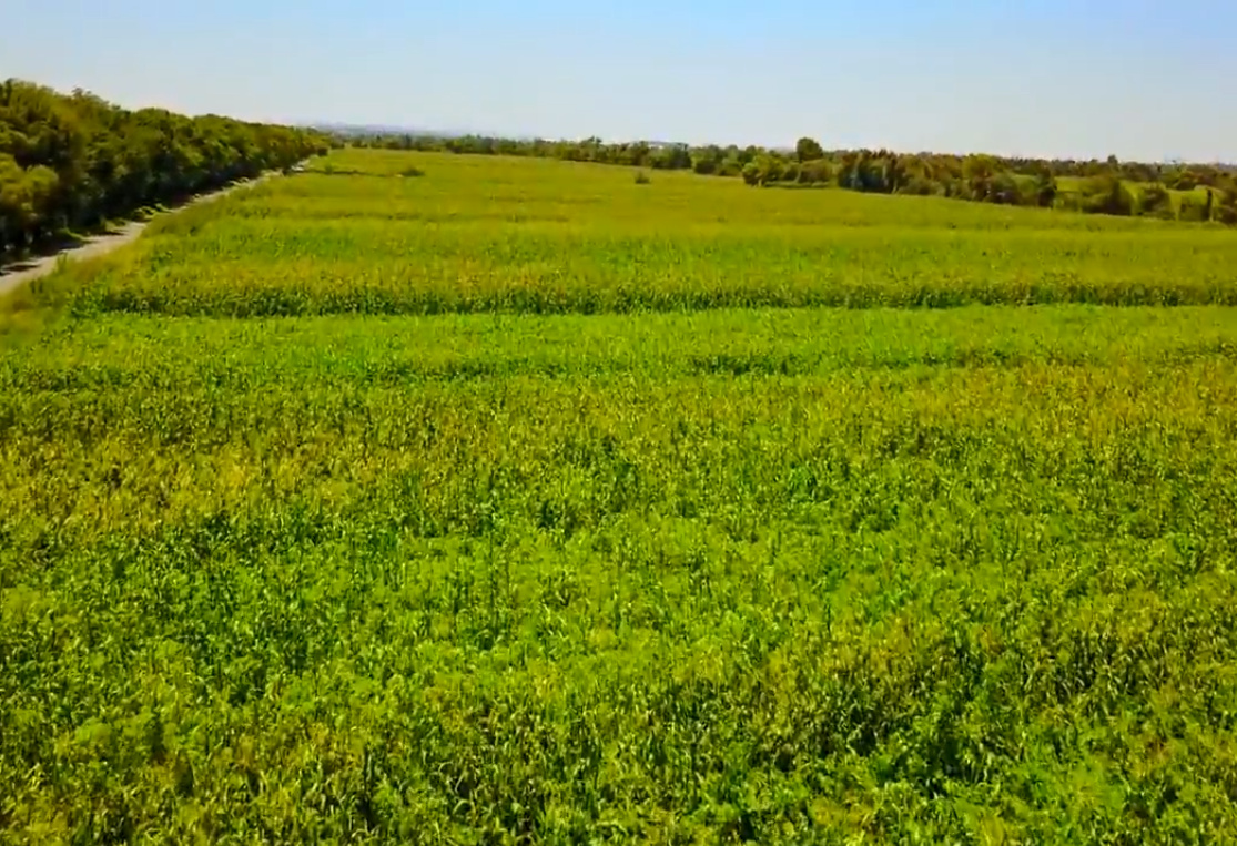 Campos de cultivo de maíz, Zacatelco